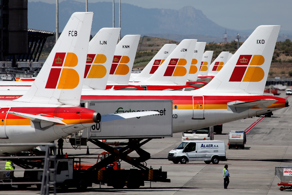 lineup Iberia T4